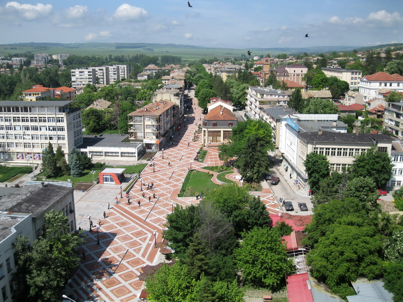 Новата пешеходна зона в центъра на града - май 2012 г.